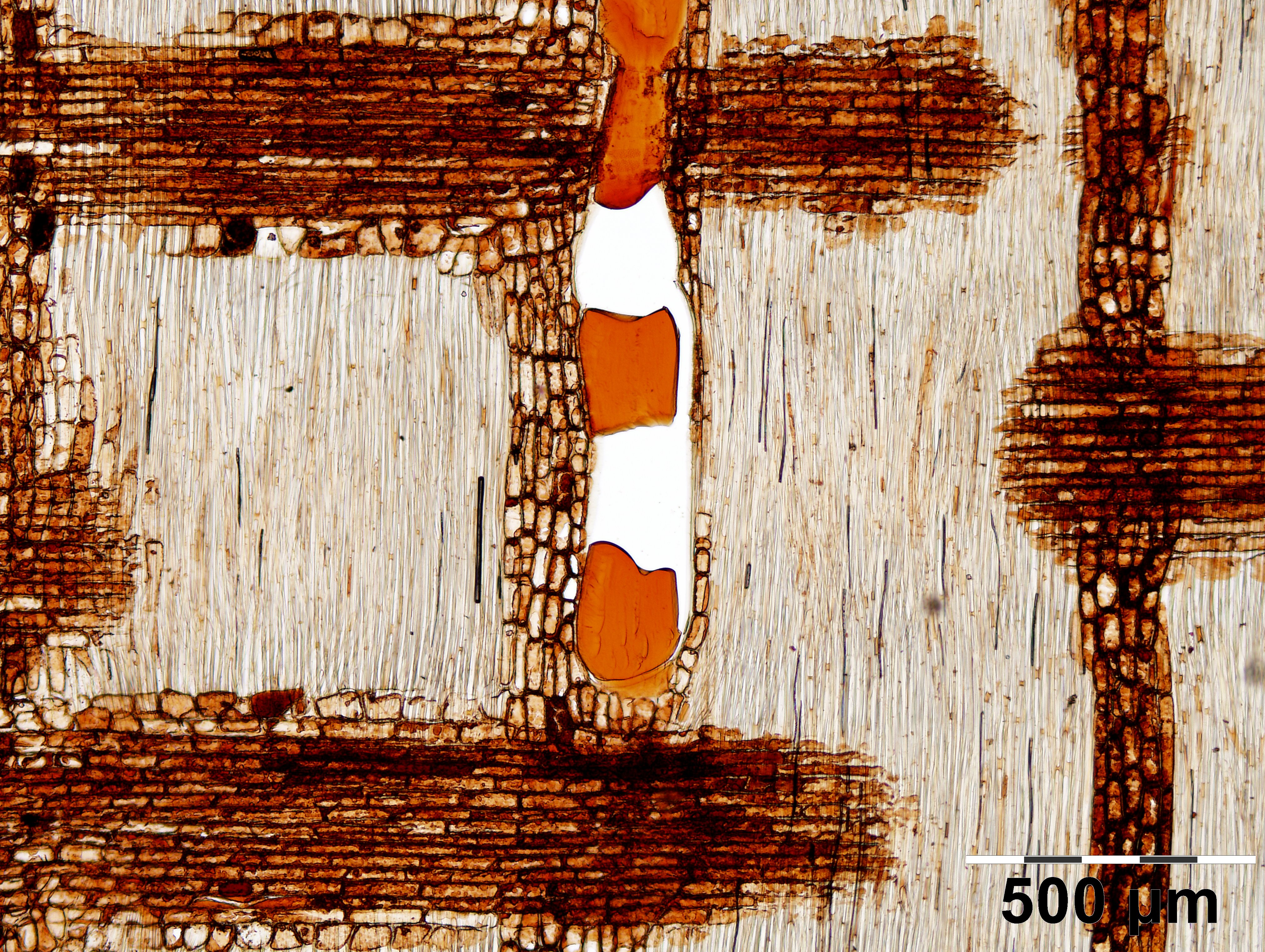 Radialschnitt des Entadrophragma candollei